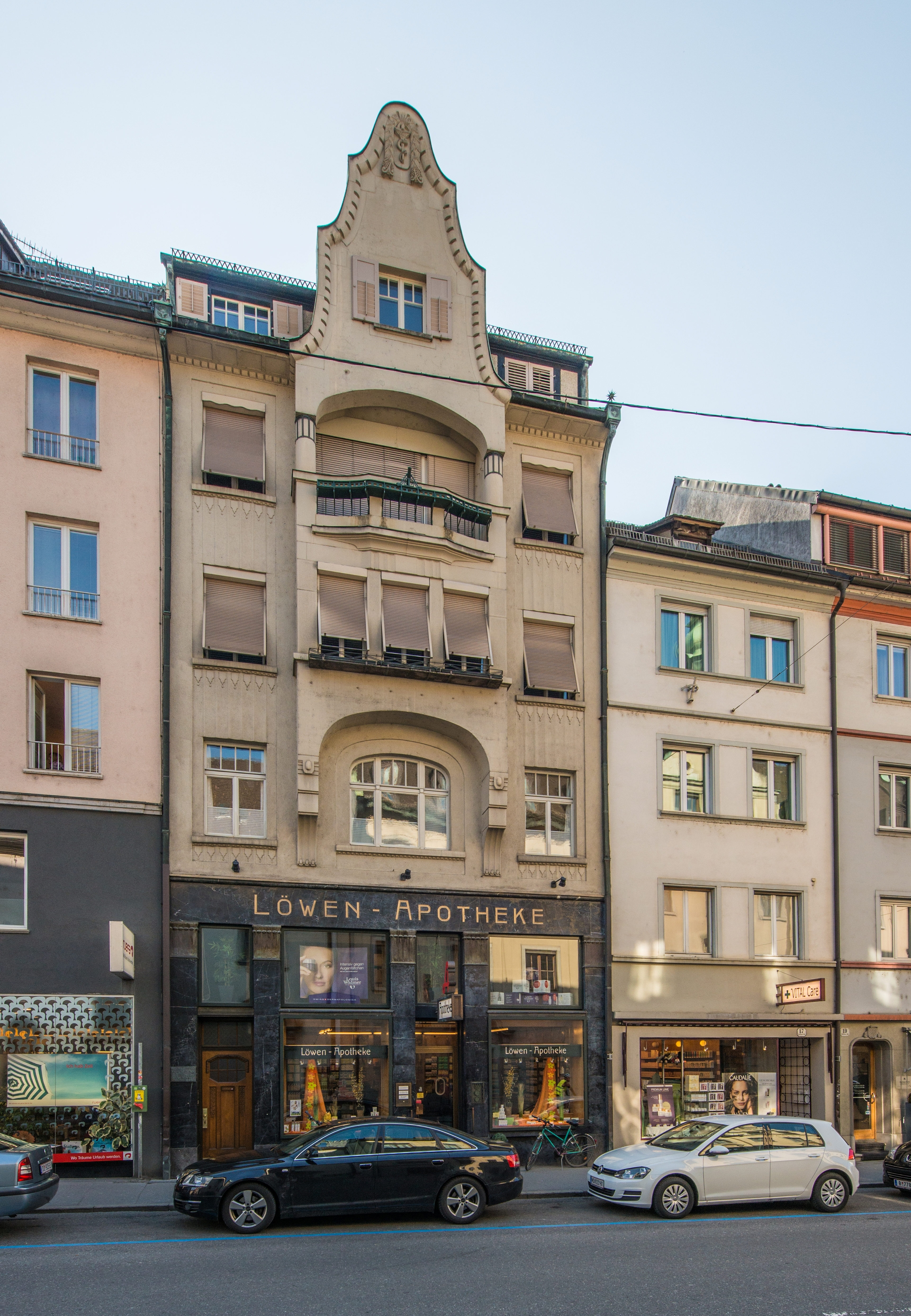 aus dem DEHIO Vorarlberg 1983: Rathausstrasse Nr.15 Apotheke, erbaut 1913 von Otto Mallaun. Schmaler sezessionistische Bau mit übergiebeltem flachen Erker, Dekorformen der Wiener Werkstätte . Marmorne Sockelzone, gleichzeitige Ausstattung des Geschäftslokals Josef Gaudl. *** In Bregenz.